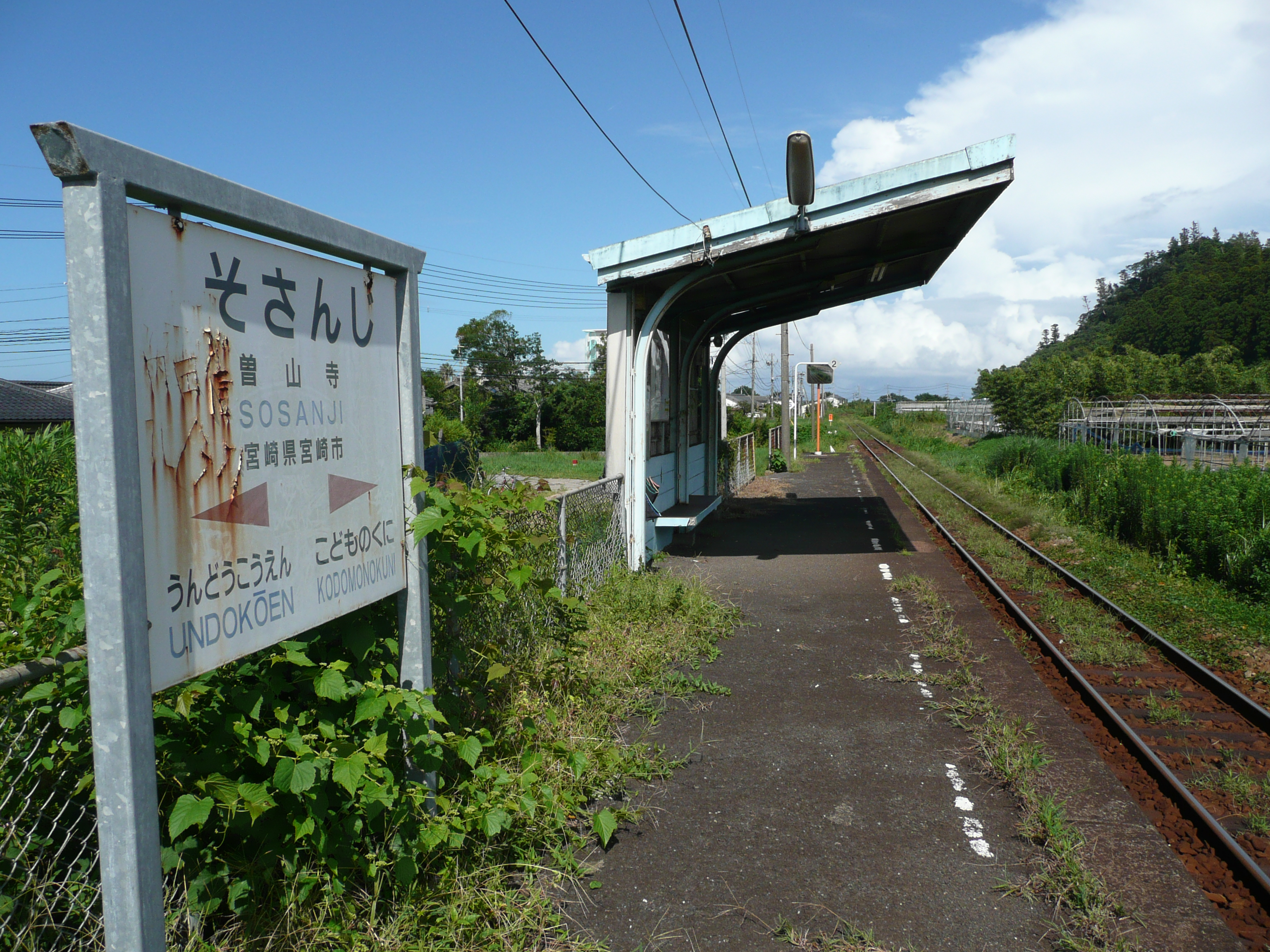 2007/8/24 日南線・曽山寺駅 撮影&投稿者:Sanjo